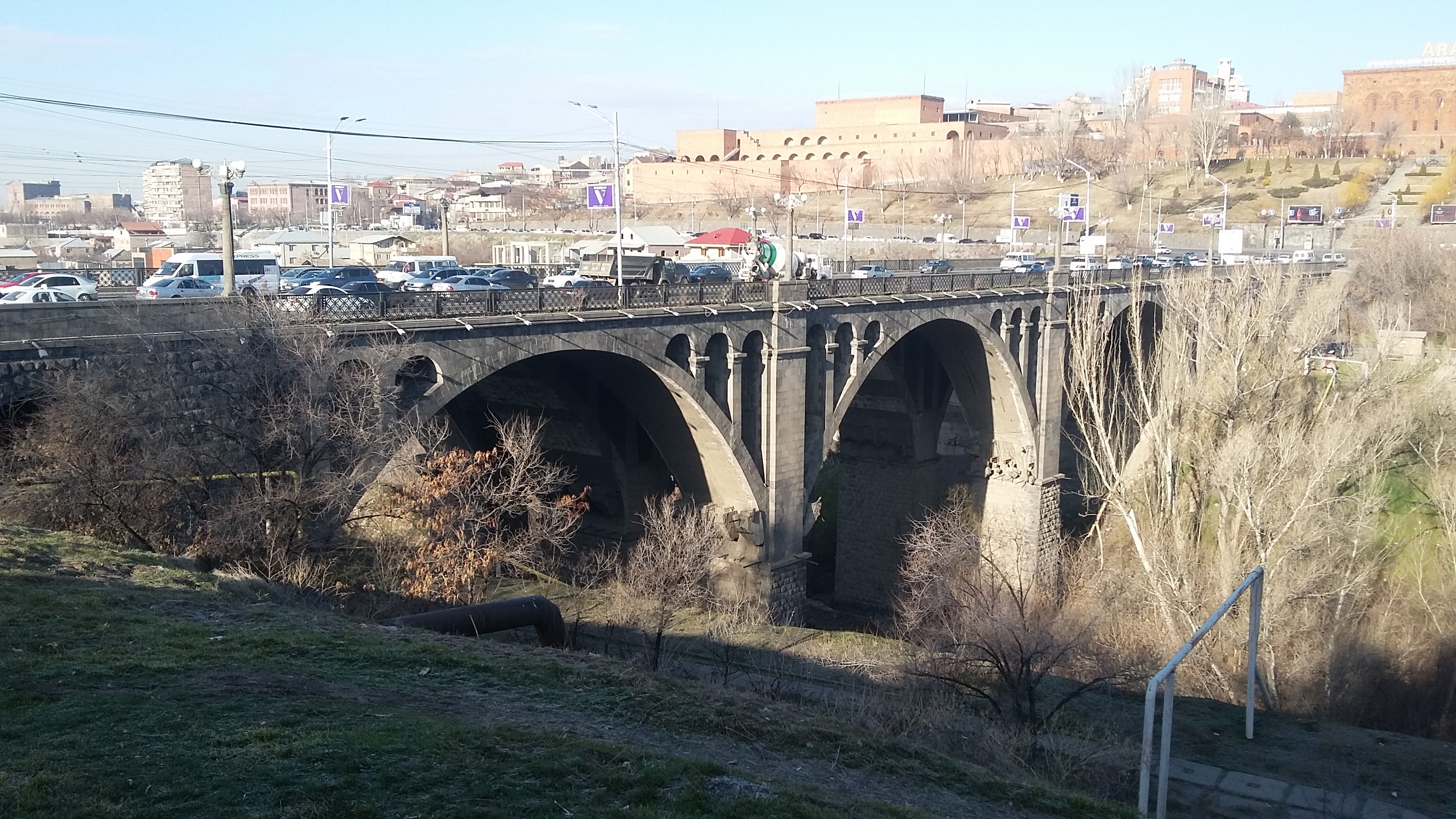 Հաղթանակ կամուրջ, Երևան